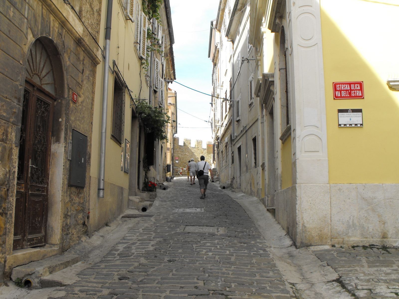 Stek ulice IX. korpusa in Istrske ulice v Piranu. Na desni cerkev Marije Tolažnice.